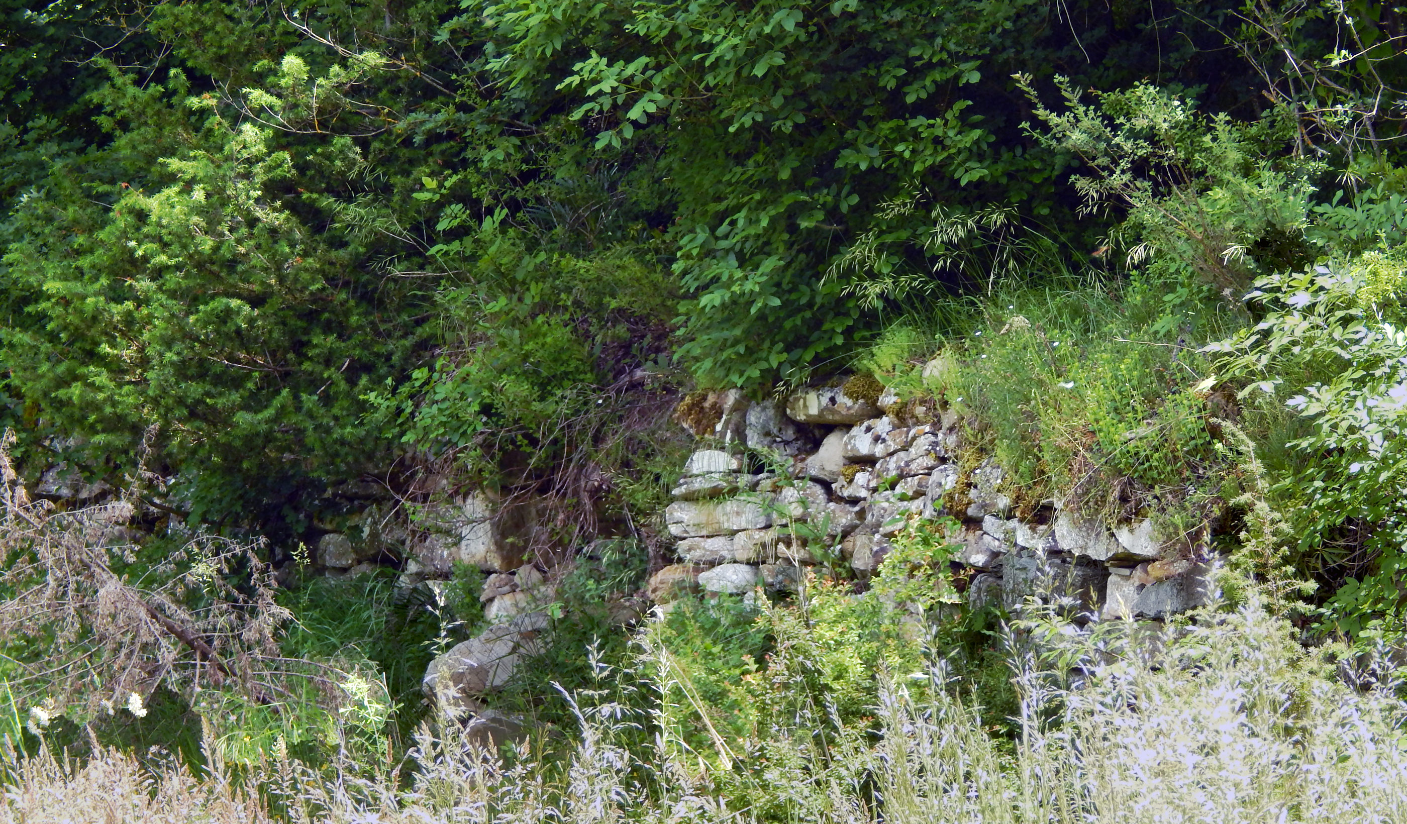 Resti di un muretto a secco che si trova lungo il percorso del Sentiero Tufo di Arquata - Grisciano. Il percorso congiunge i due paesei ed il manufatto insiste nel territorio comunale di Arquata del Tronto, in provincia di Ascoli Piceno.